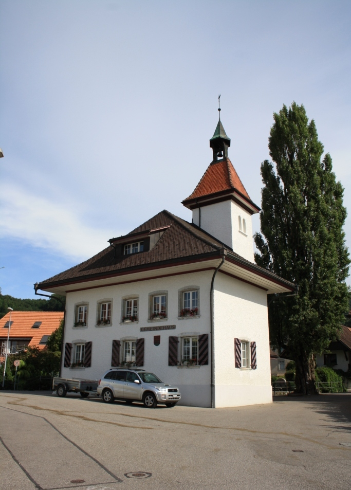 Gemeindehaus Attiswil